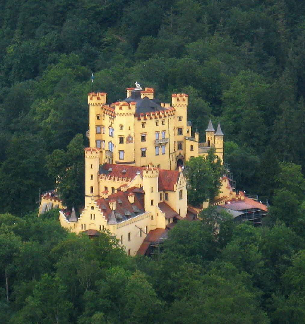 Blick auf Hohenschwangau von Neuschwanstein